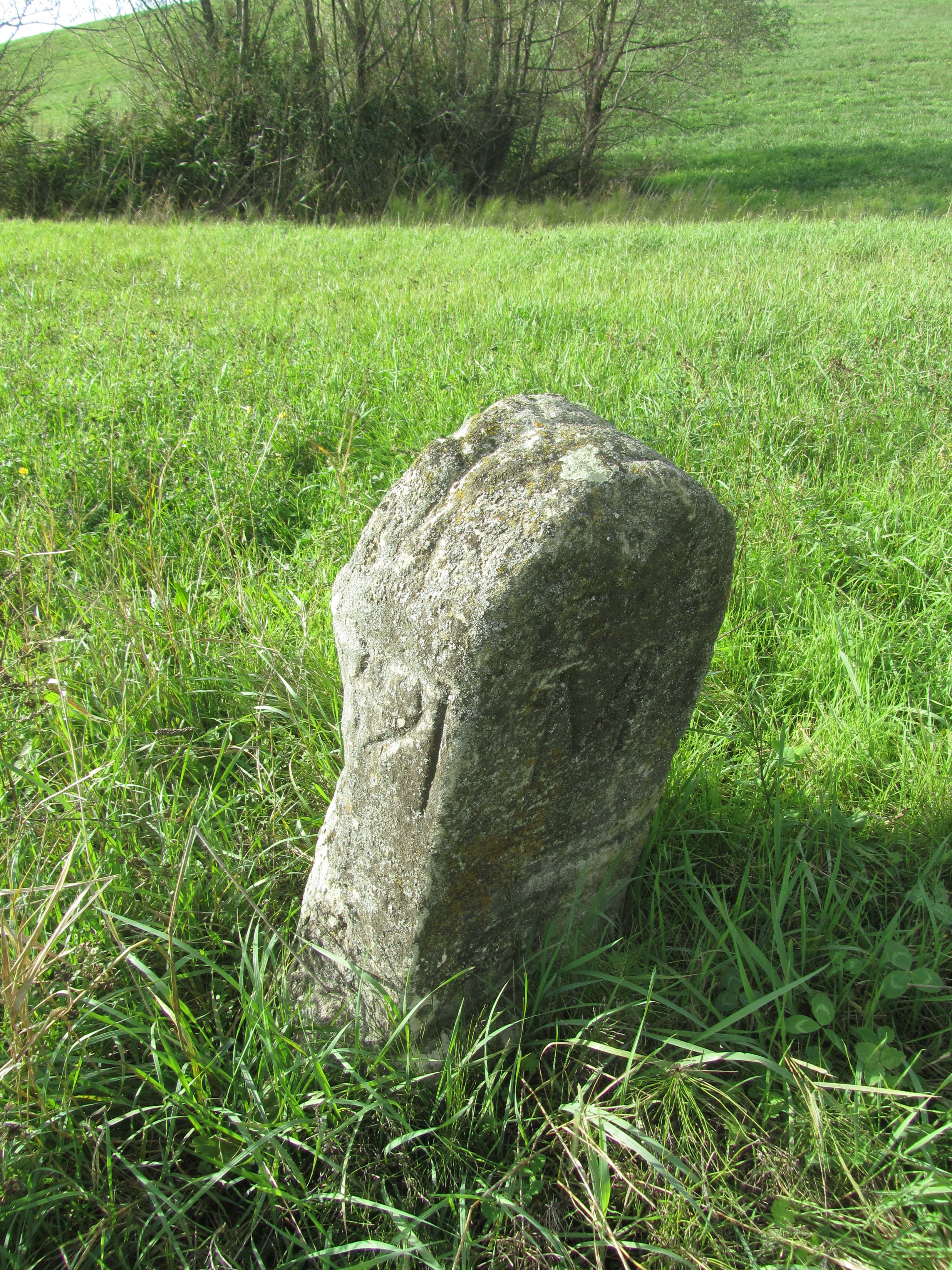 Cippo di confine tra il Ducato di Modena e quello di Parma, Costamedolana, Casina, provincia di Reggio nell'Emilia.